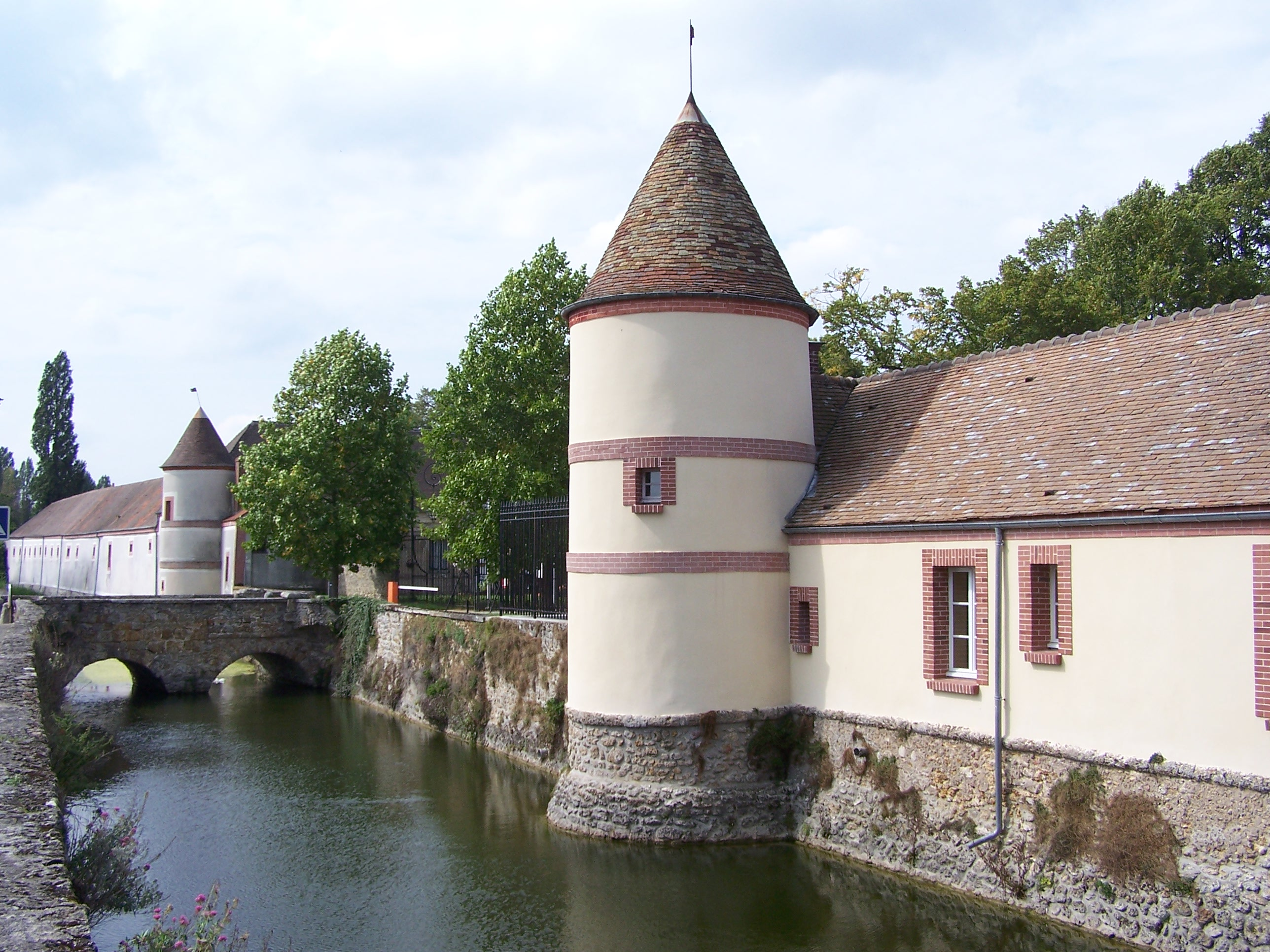 Mairie-château du Mesnil-Saint-Denis (Yvelines, France)